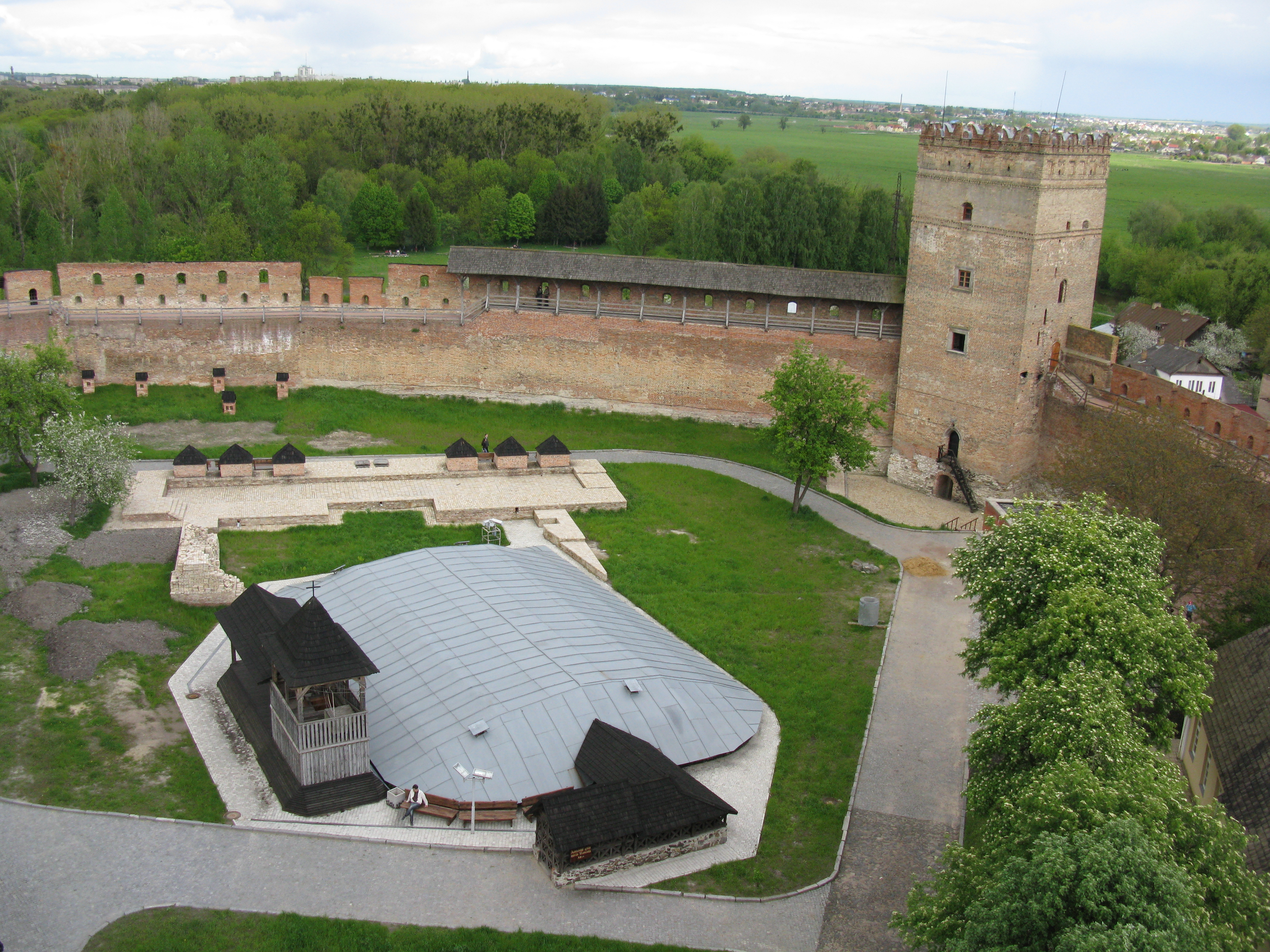 Луцький замок.